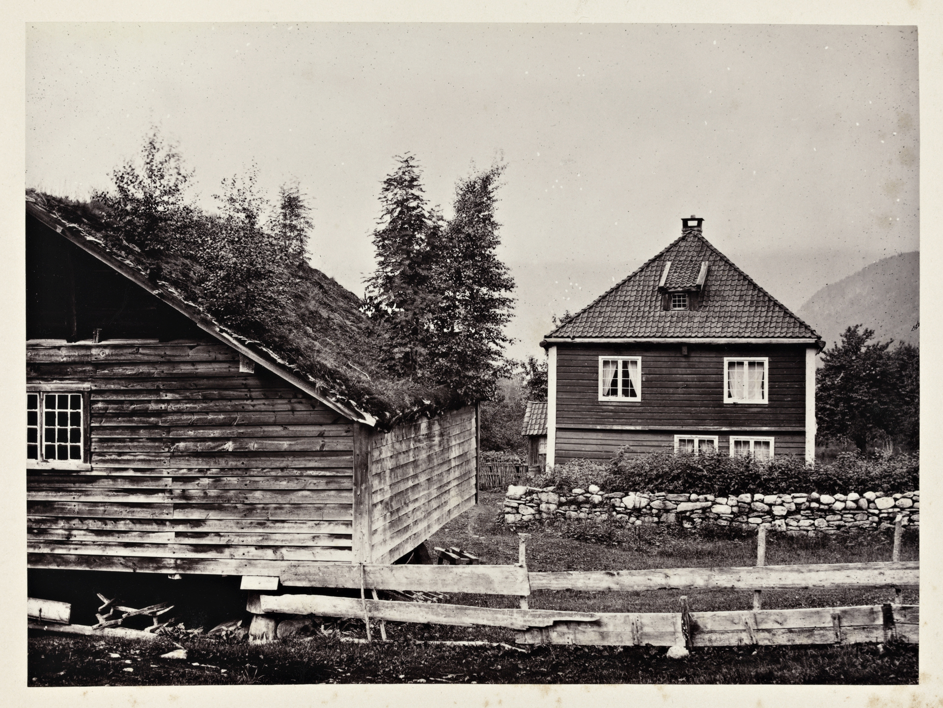 Tittel / Title: s. 58 Prestagaard Indvik Motiv / Motif: Albuminkopi. Dato / Date: 1869 Fotograf / Photographer: Edward Backhouse Mounsey (1840-1911) Sted / Place: Sogn og Fjordane, Stryn, Innvik Eier / Owner Institution: Nasjonalbiblioteket / National Library of Norway Lenke / Link: Bildesignatur / Image Number: bldsa_Alb_BH060